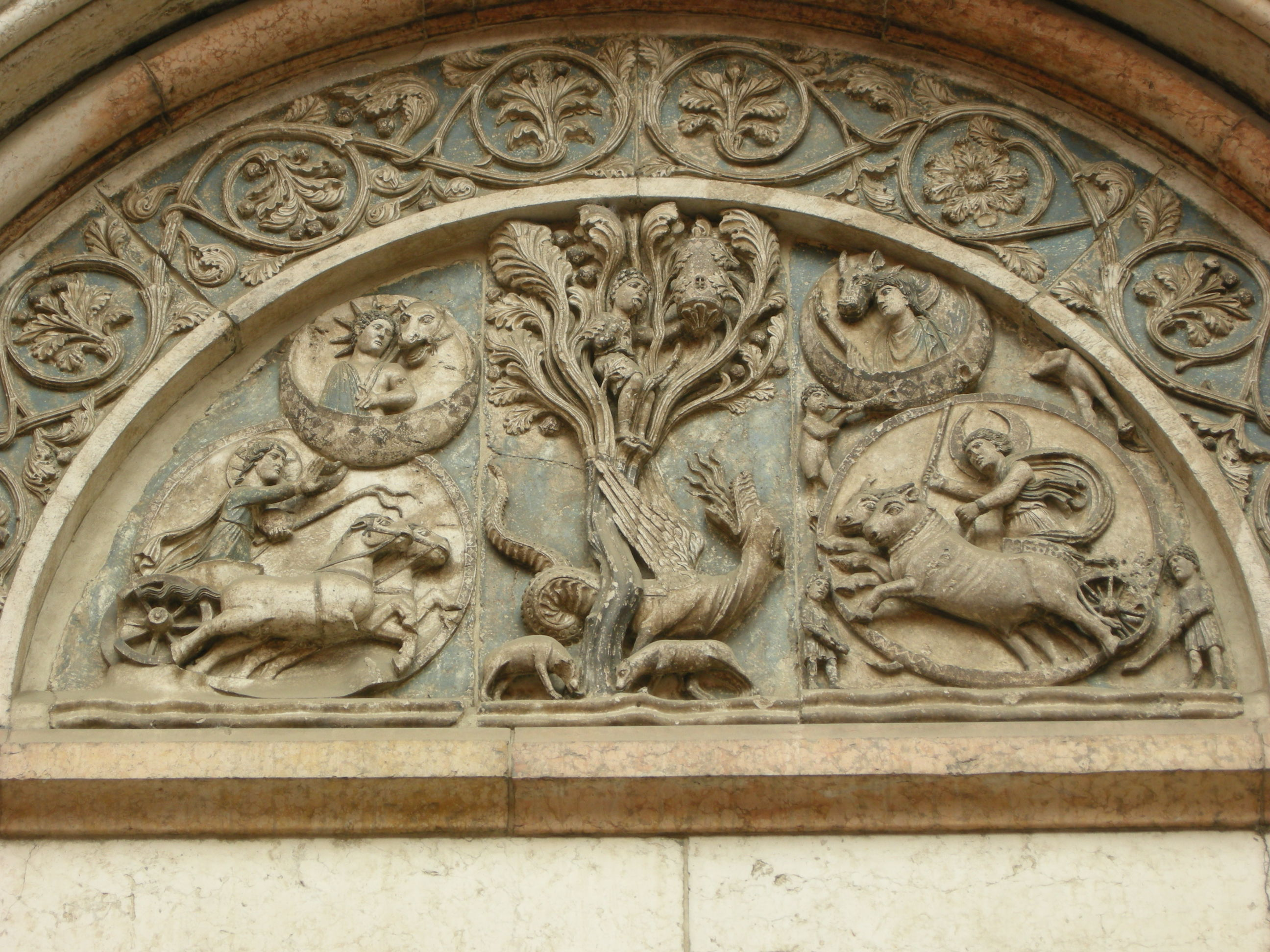 Battistero di parma, portale sud 03 leggenda di barlaam